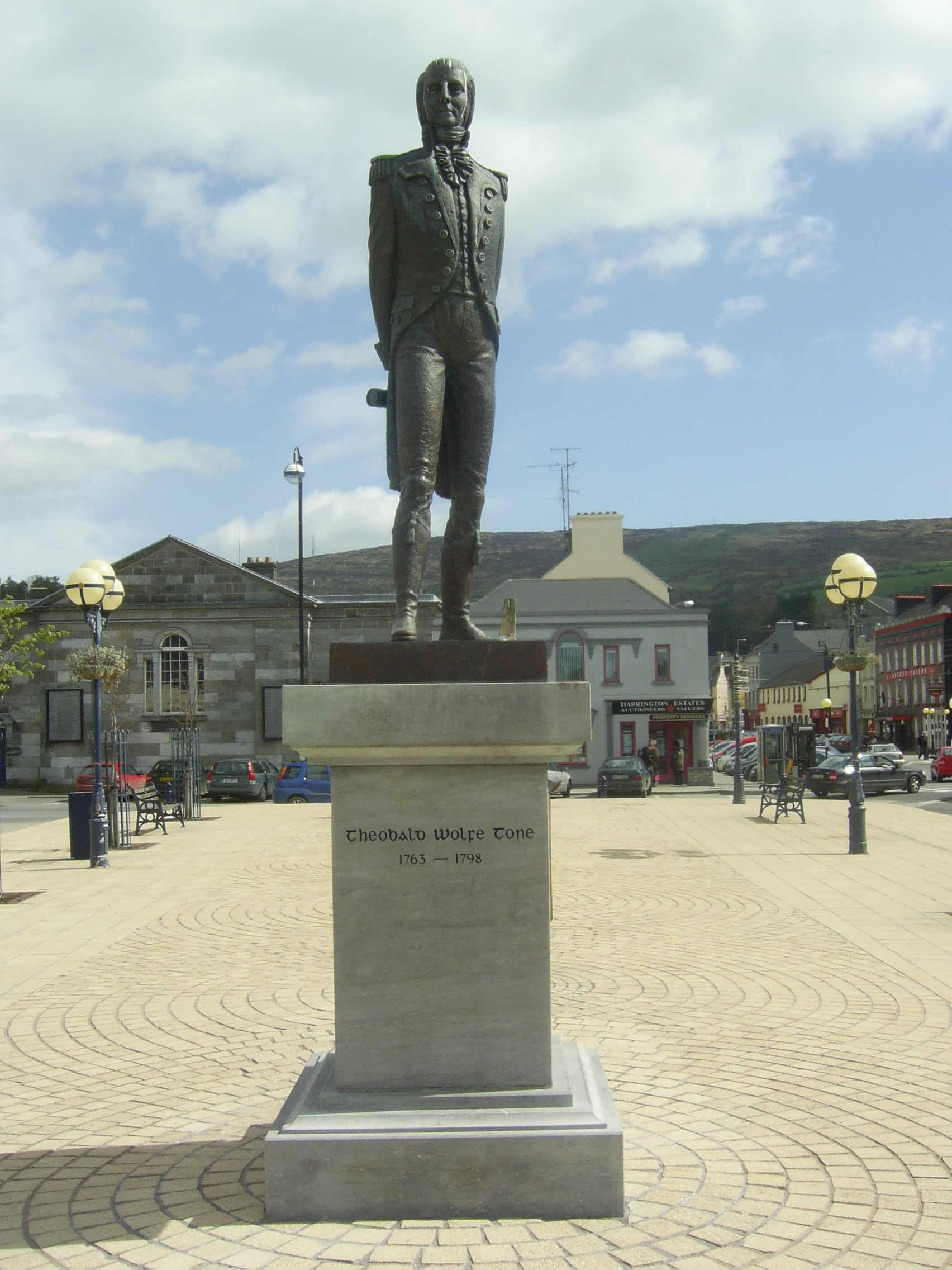 Wolfe Tone sculpture Bantry